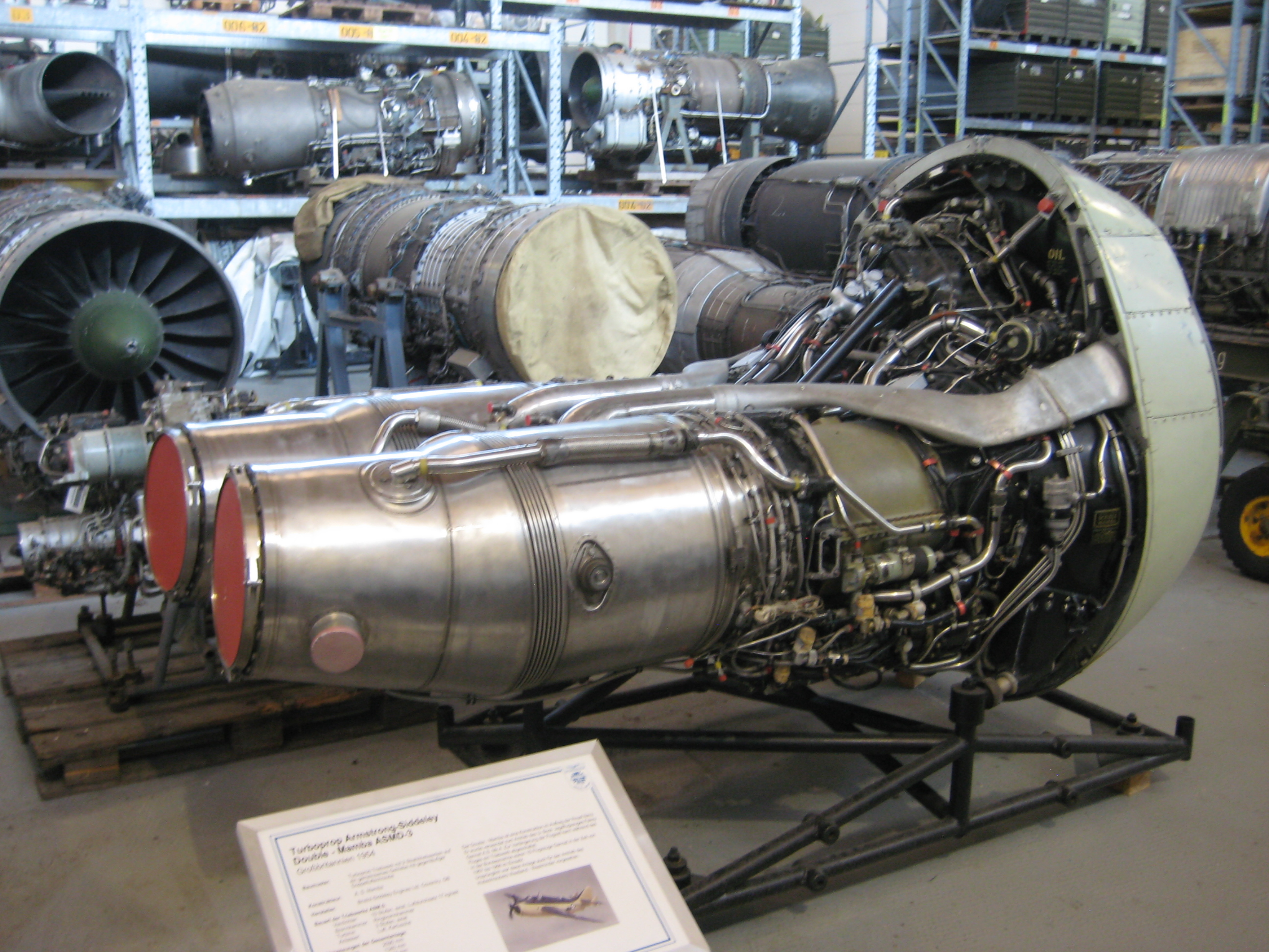 Luftwaffenmuseum Gatow